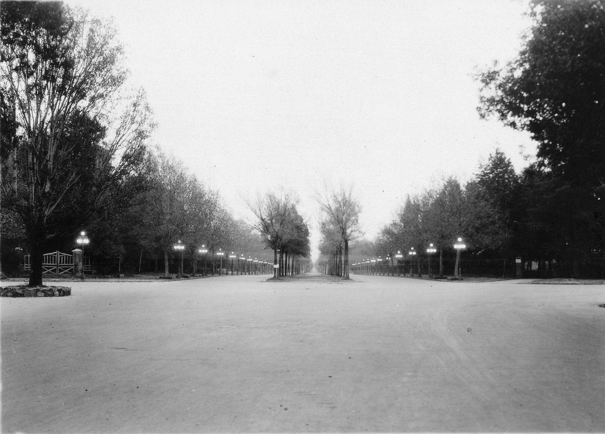 Fotografía antigua de la Ciudad de México resguardadas por el Museo Archivo de la Fotografía (MAF) de la Ciudad de México.